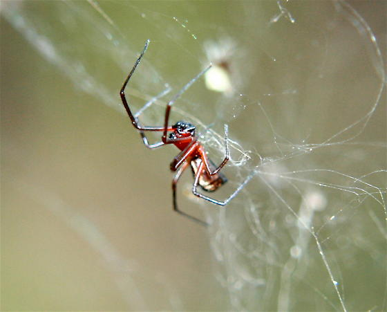 A male Bowl and Doily Spider (Frontinella pyramitela).